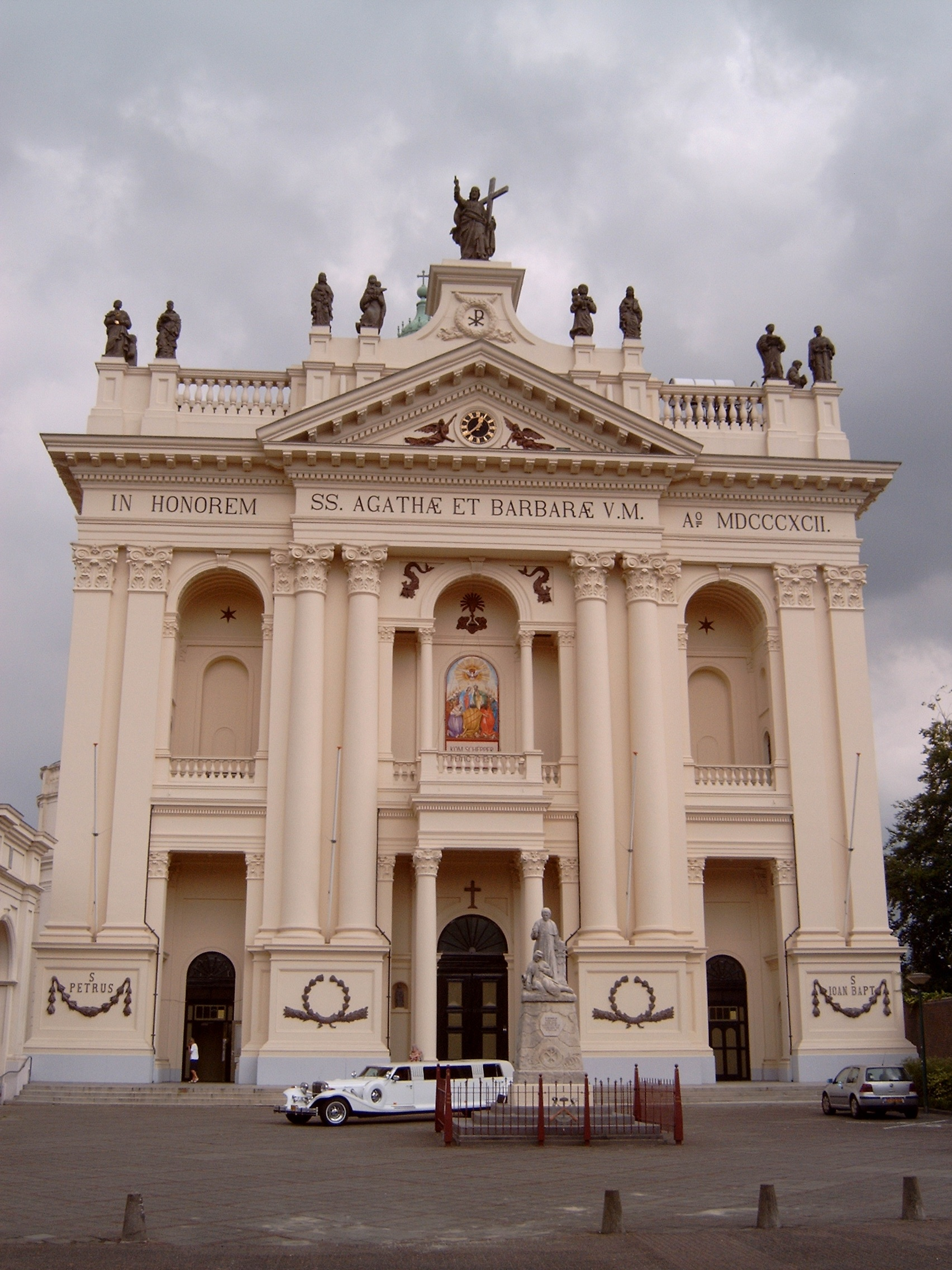 Oudenbosch, kathedraal